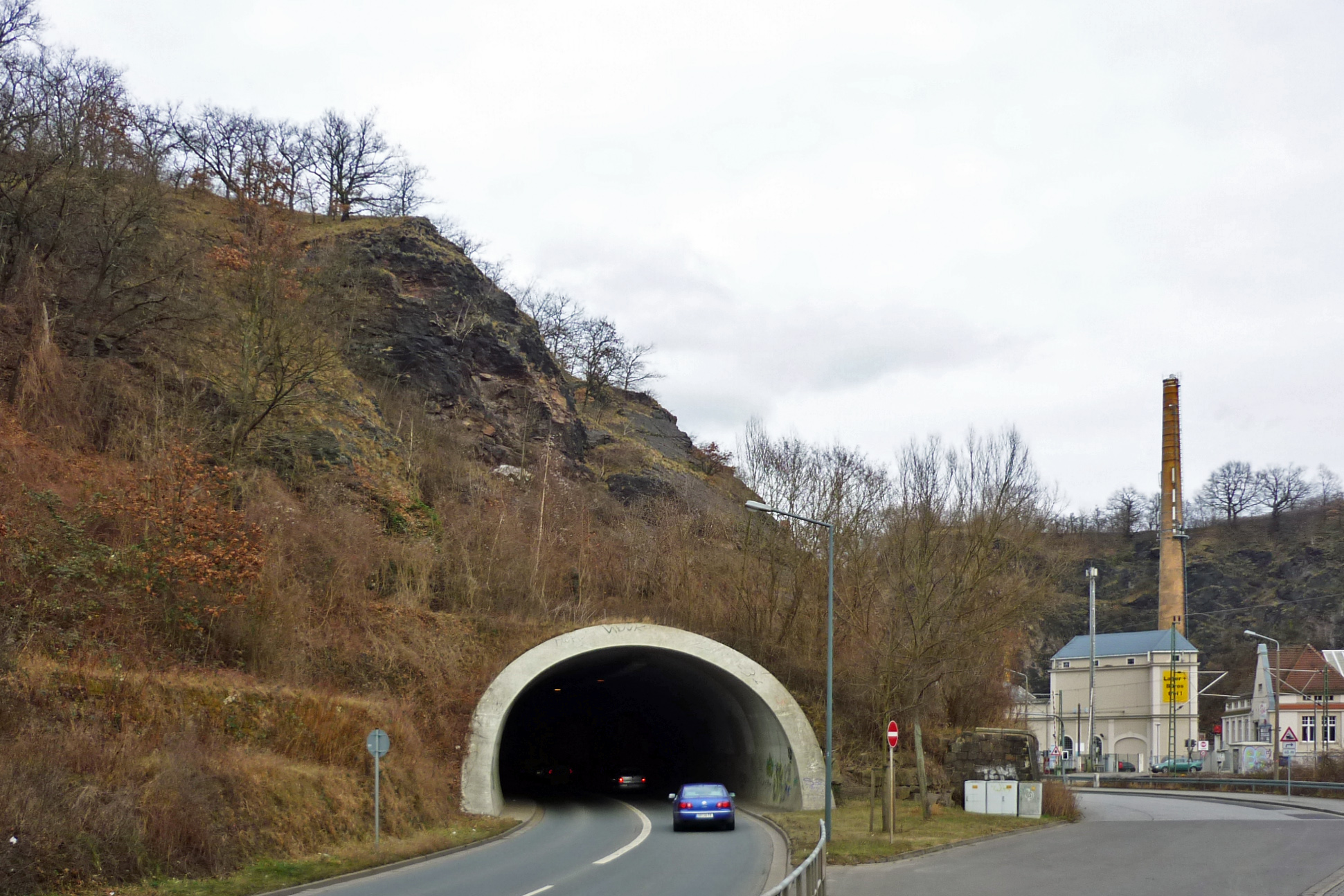 Straßentunnel in Dresden Tharandter Straße und ehemalige Felsenkellerbrauerei